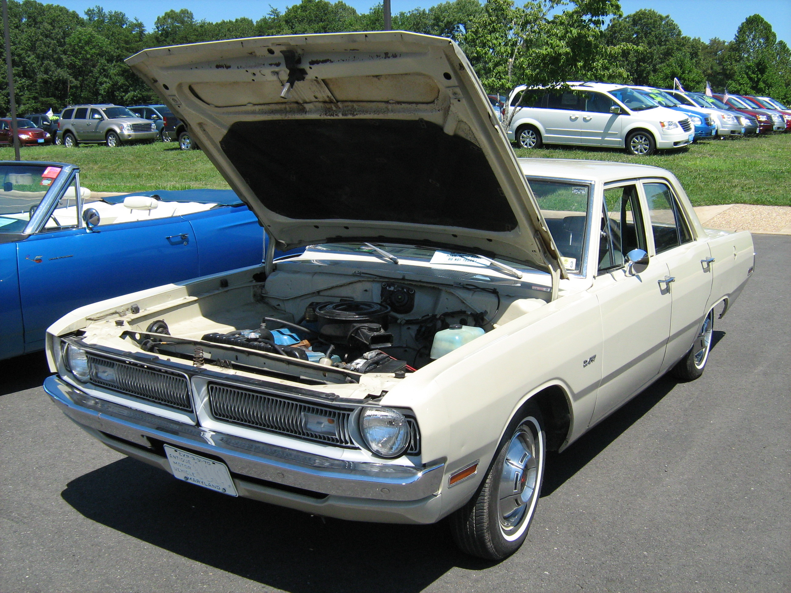 1970 Dodge Dart four-door sedan